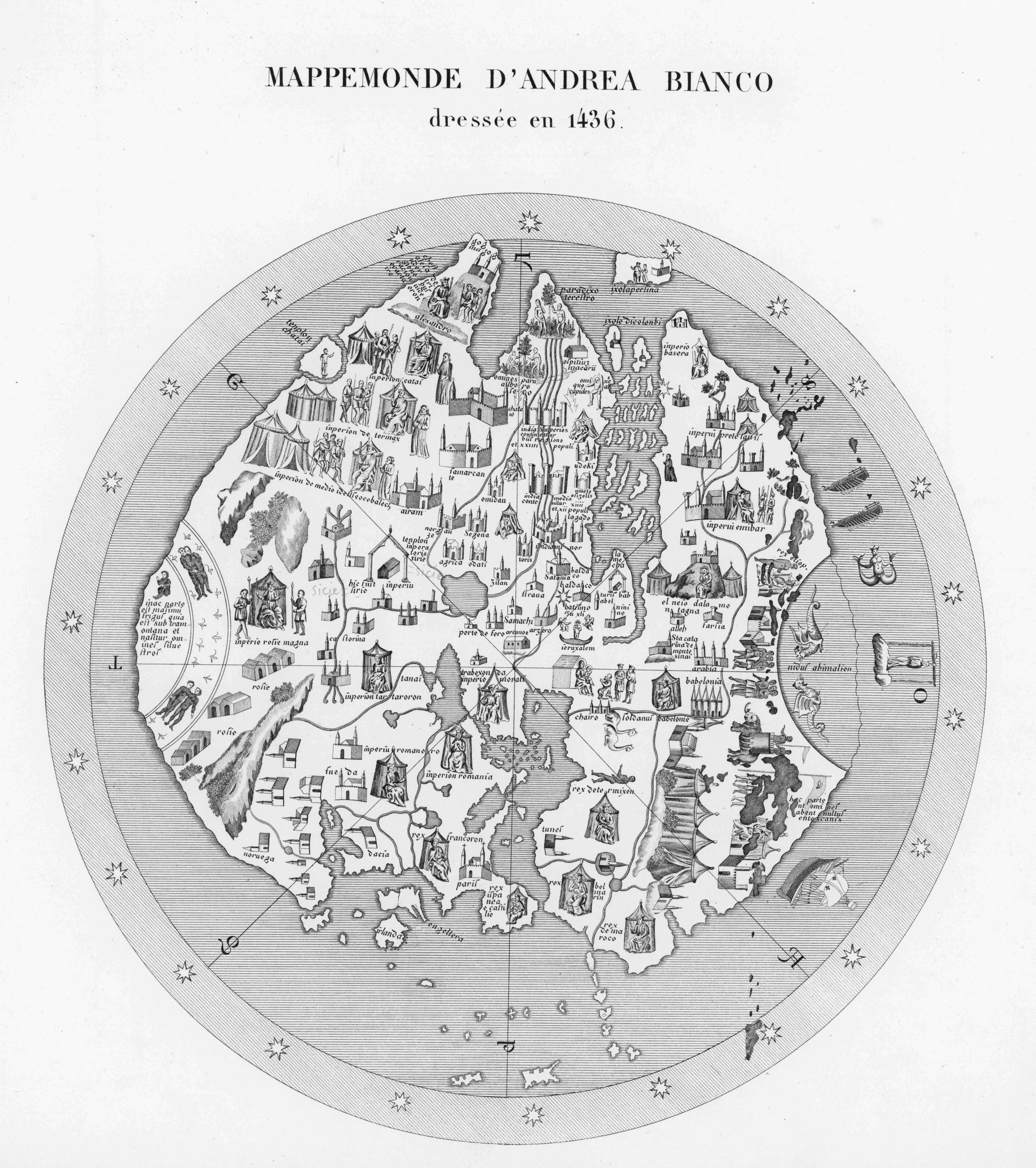 Imperie rosie magna (Империя великой Росии)